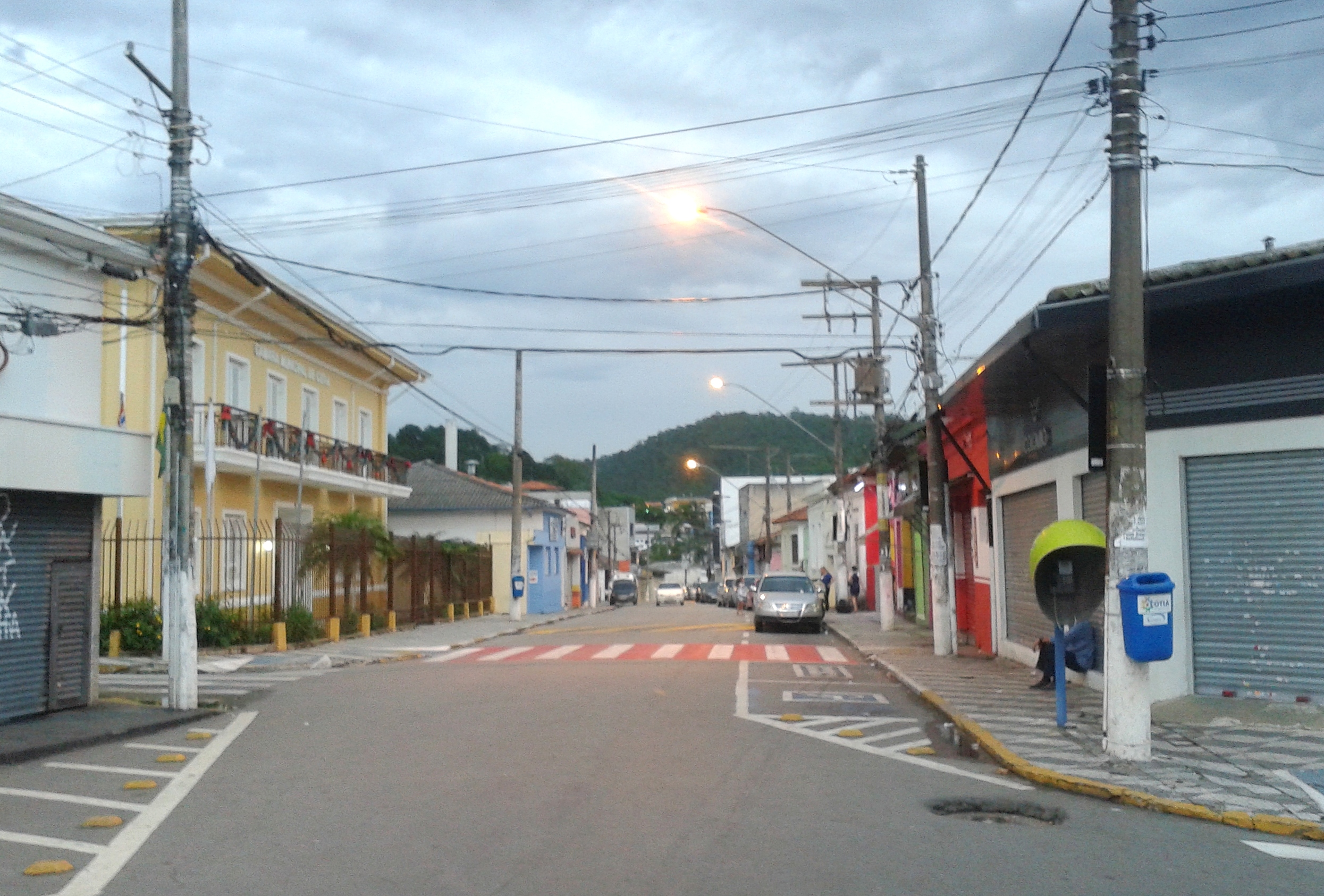 Rua no Centro de Cotia, SP, Brasil.